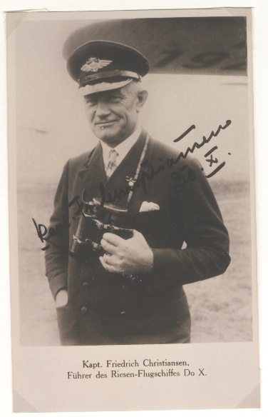 Dievenow na starej fotografii.